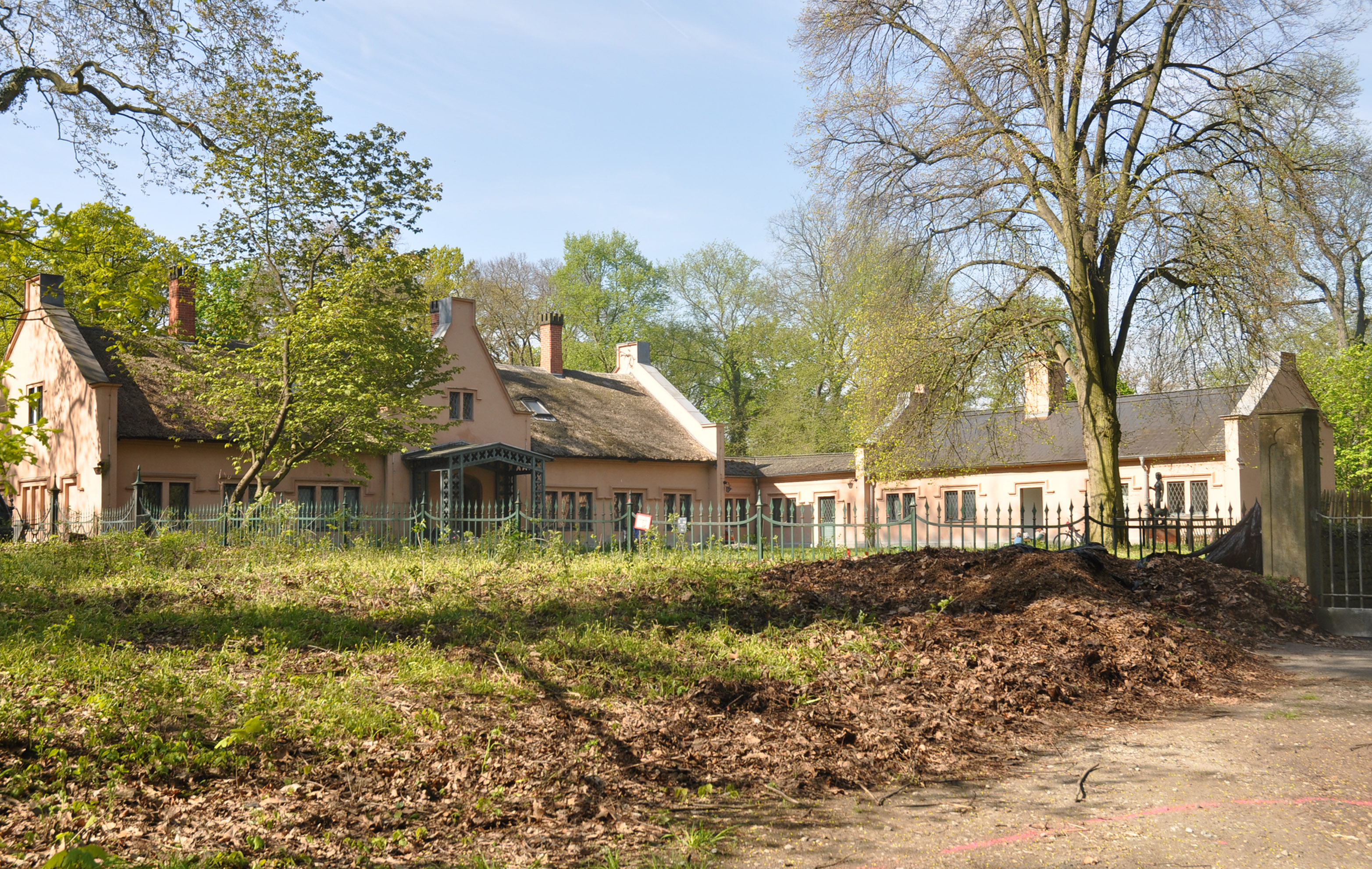 Park Klein-Glienicke, Anbau des Jägerhofs von 1935 (rechts)